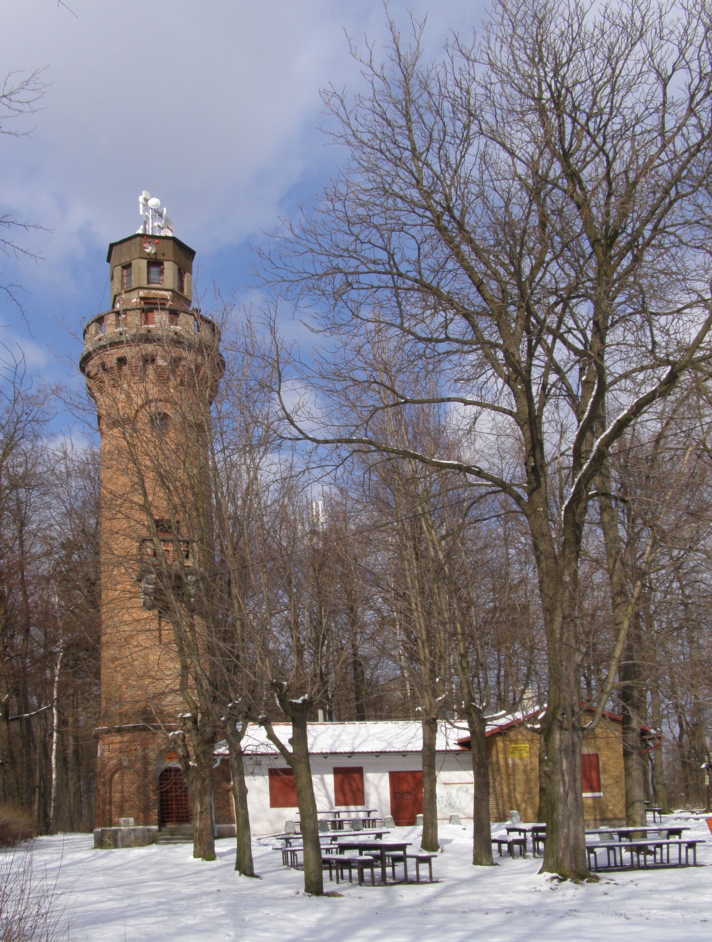 Frýdlant, rozhledna na vrcholu U Rozhledny (399 m n. m.))